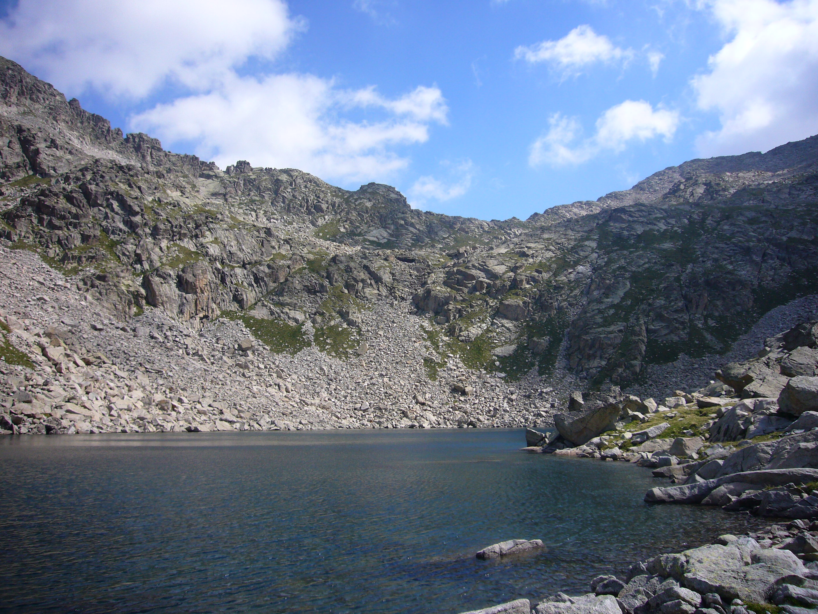 Estany Superior i Coll de Comalesbienes, vists des de l’Estany Superior de Comalesbienes; la Vall de Boí, Alta Ribagorça, Catalunya